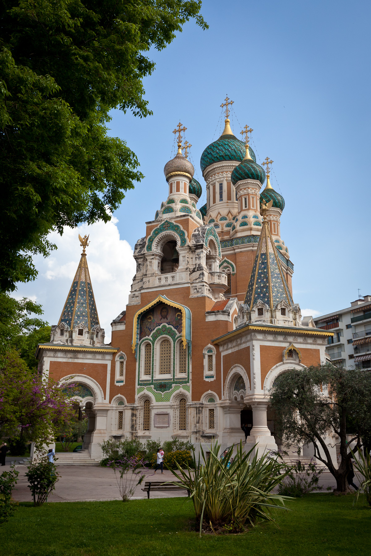 Nice